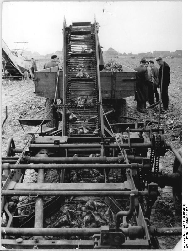 Kitzen, Rübenvollerntemaschine Zentralbild Dittrich 30.10.1956 Der verwandelte Schatzgräber aus Kitzen Um die Zuckerrübenernte zu vereinfachen, die Flächenleistung zu erhöhen und die Ernteperiode zu verkürzen, haben die Kollegen der MTS Kitzen, Krs. Leipzig , aus eigenen Mitteln eine Rübenvollerntemaschine entwickelt. UBz: Die geköpften Rüben werden von den zur Vollerntemaschine umgebauten " Schatzgräber" gerodet und über ein Förderband sofort auf dem angehängten Wagen transportiert. Zur Zeit werden nach dem Muster der in Kitzen entwickelten Vollerntemaschine bei der MTS Spezialwerkstatt Liebertwolkwitzweiter " Schatzgräber " umgebaut.